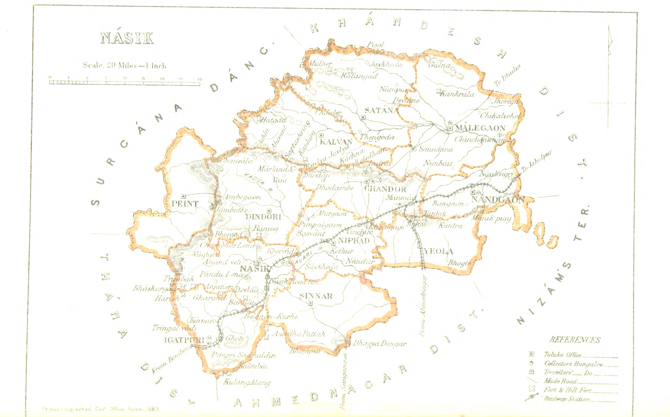 Nasik district 1896